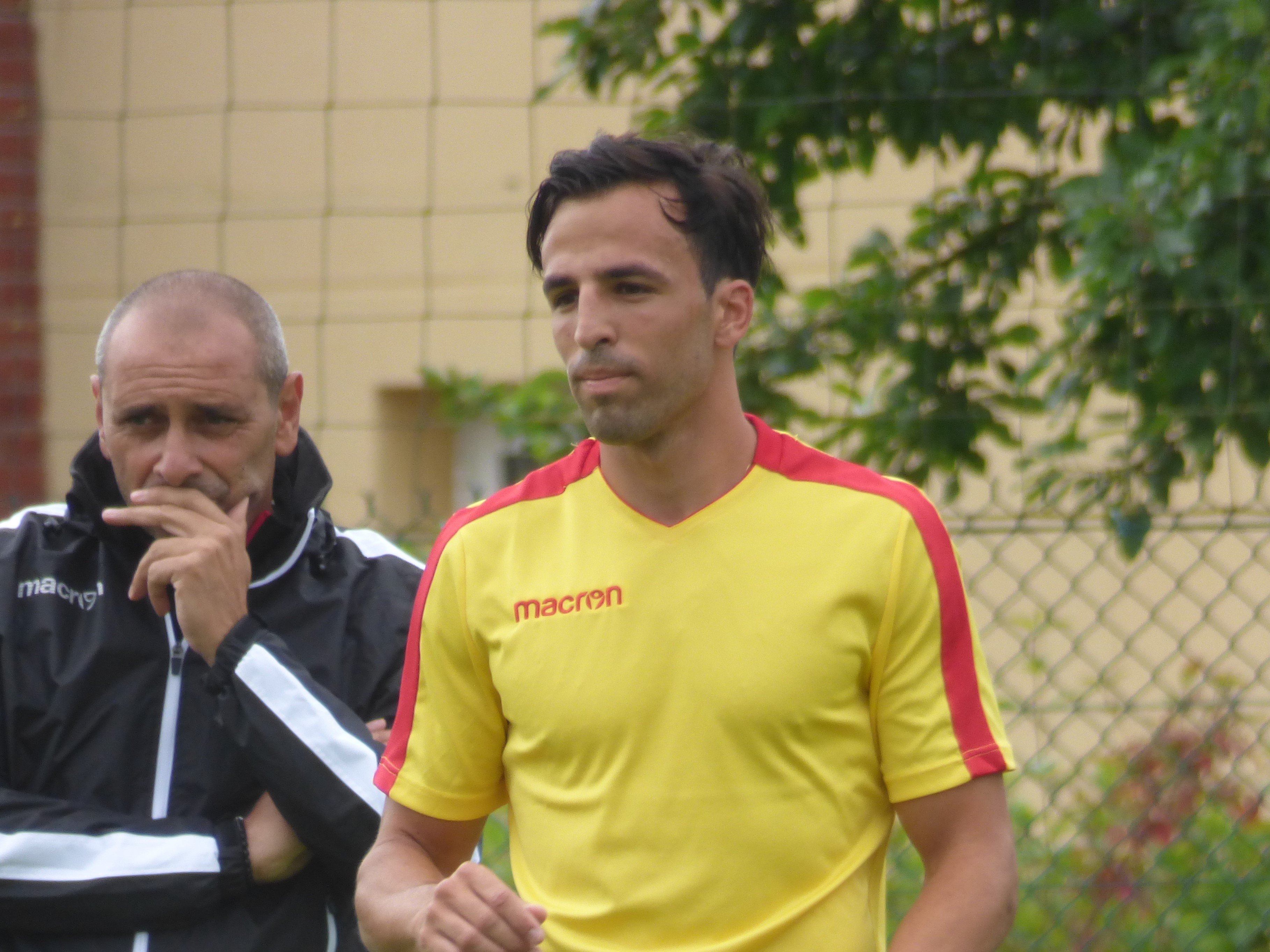 Filip Markovic lors d'un entraînement public du Racing Club de Lens, le 19 juin 2018, au centre technique et sportif de La Gaillette à Avion.